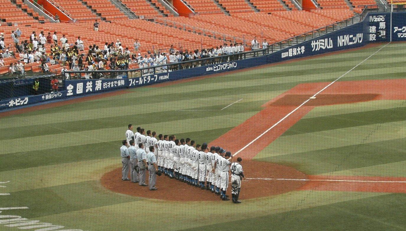 Yokohama Stadium